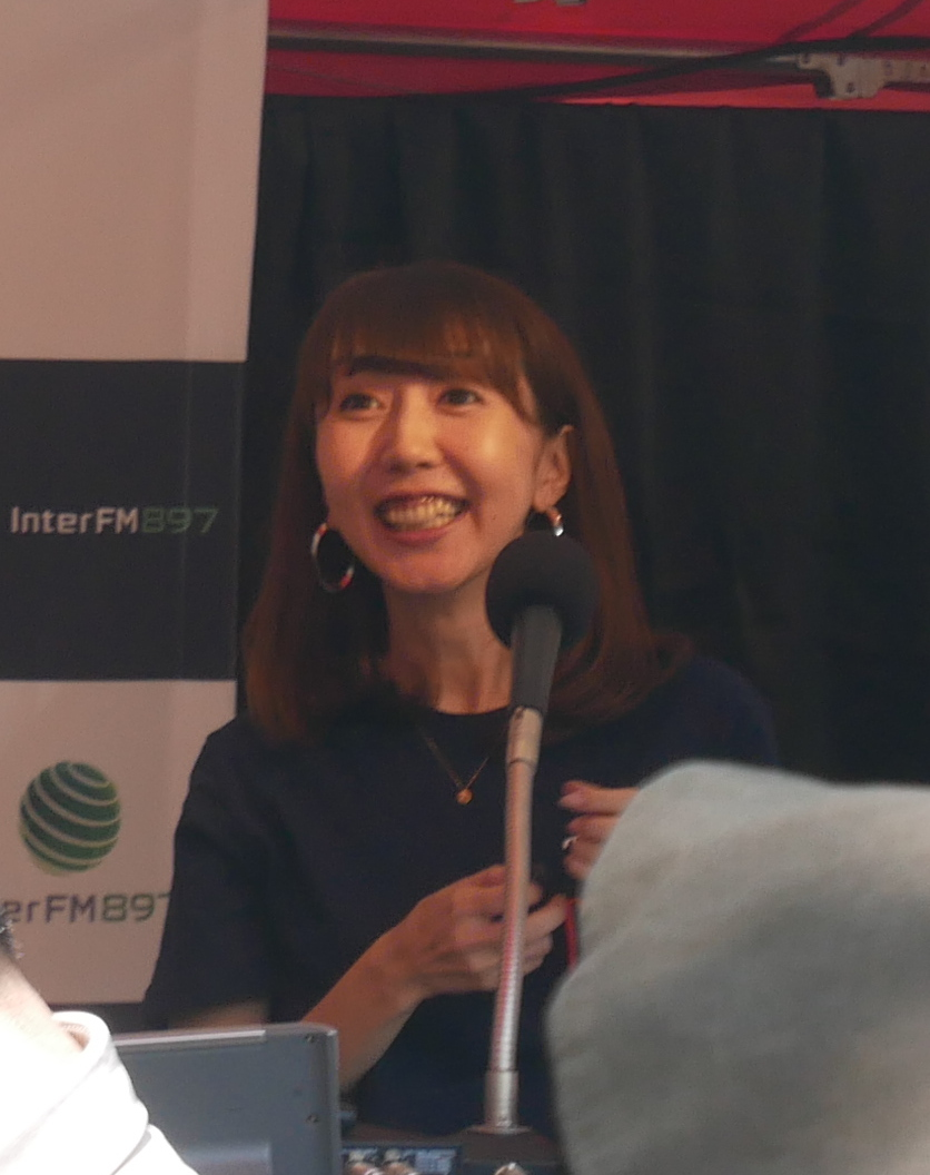 渡辺麻耶 (Maya Watanabe) Panasonic Lumix DMC-GX7 Mark II